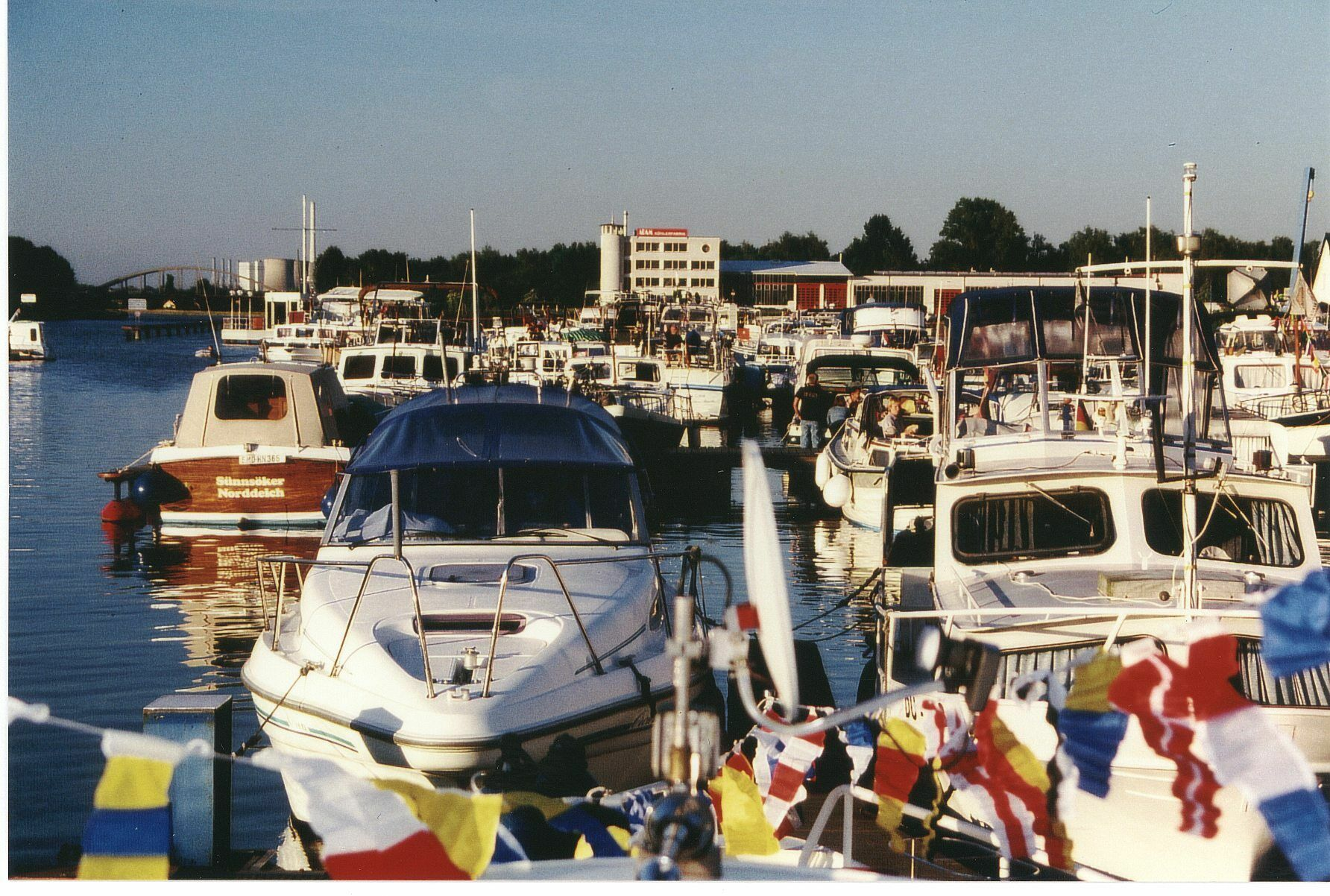 Das Westfälische Sportbootzentrum - Marina Rünthe in Bergkamen / Westphalian Sports Boat Centre - Ruenthe Marina in Bergkamen